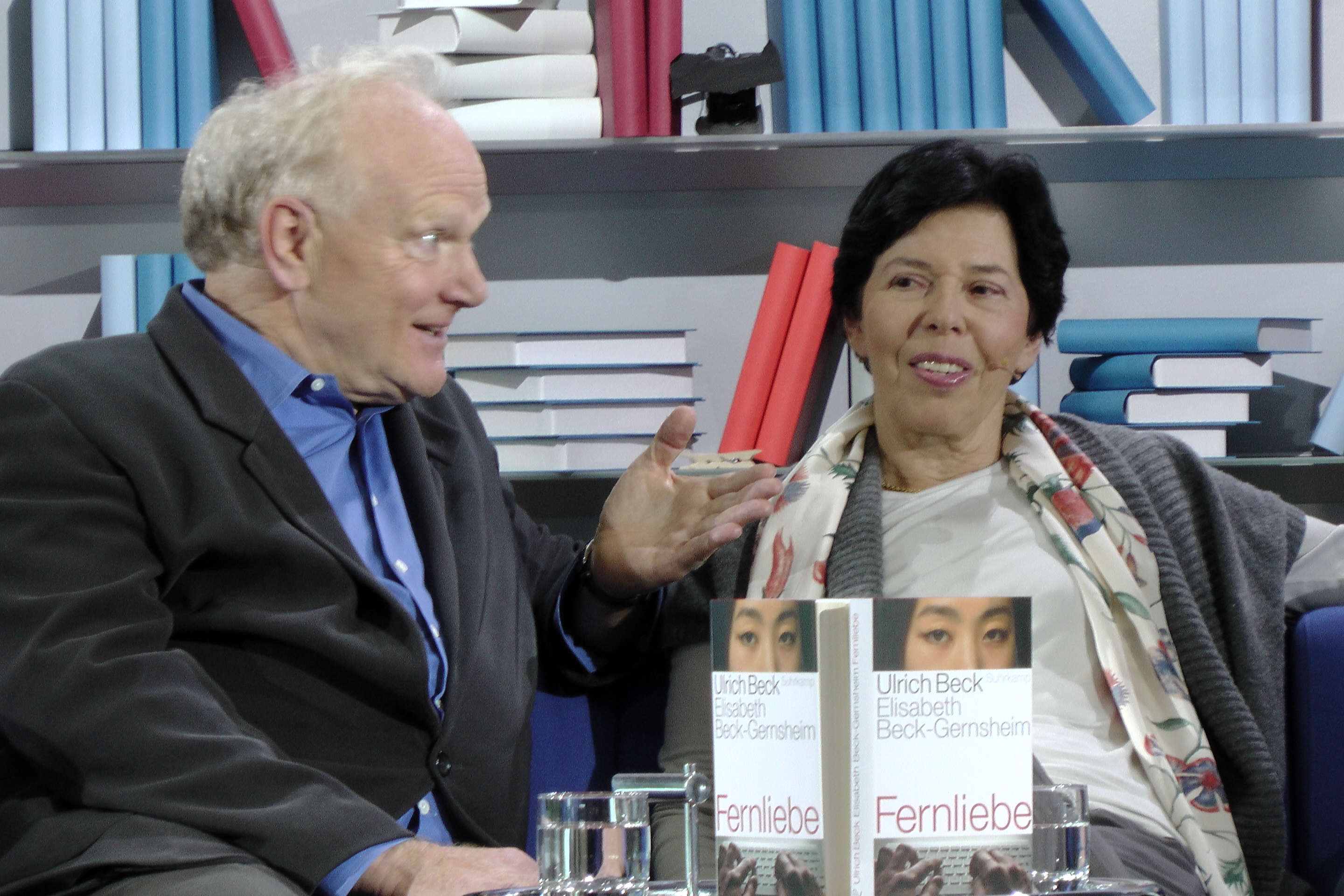 Ulrich Beck und Elisabeth Beck-Gernsheim im Gespräch mit René Aguigah. Dieses Fotos dürfen Sie honorarfrei nutzen, wenn Sie folgenden credit beachten: Copyright: Das blaue Sofa / Club Bertelsmann.